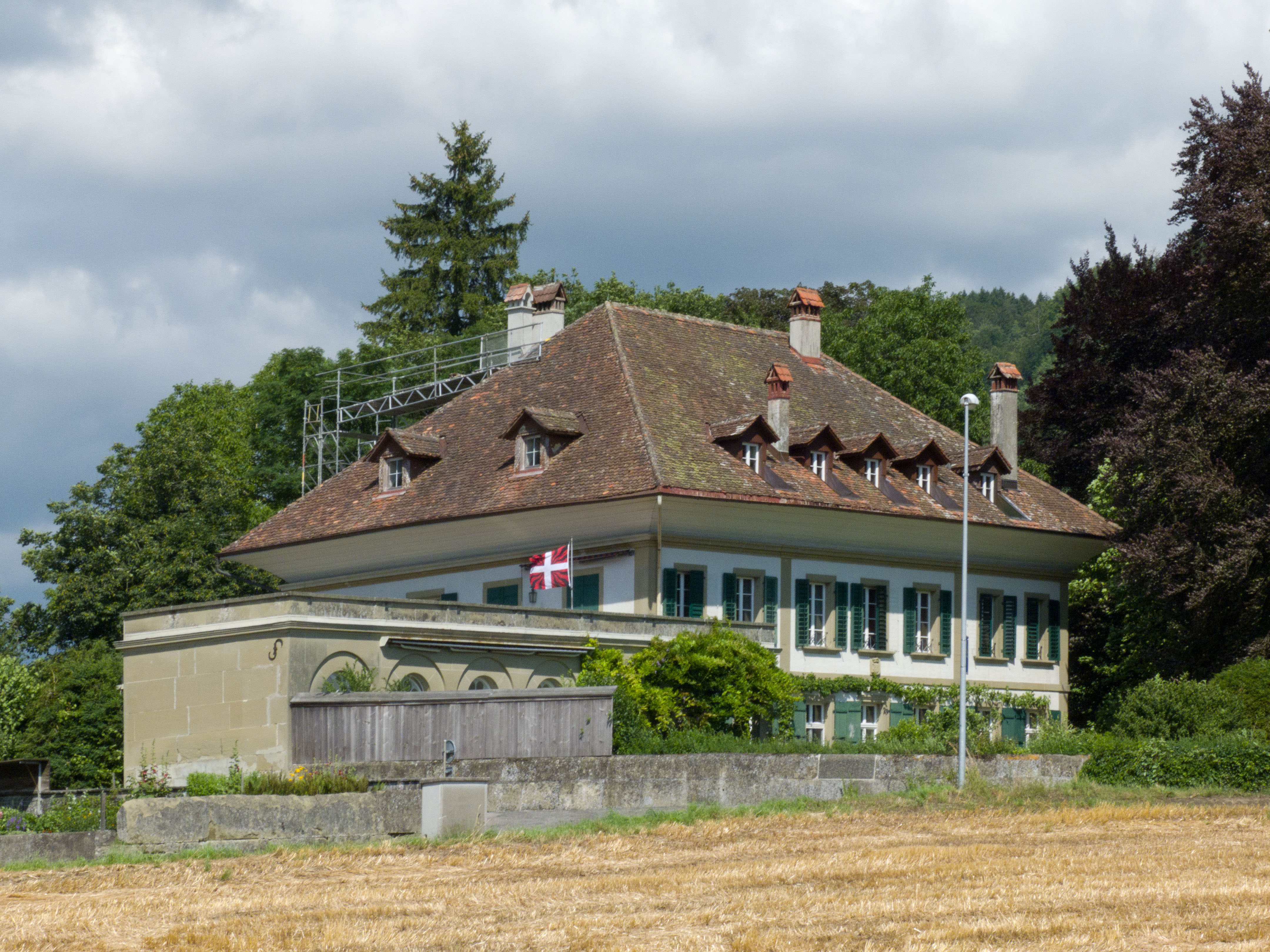 Campagne Hubelgut Habstetten